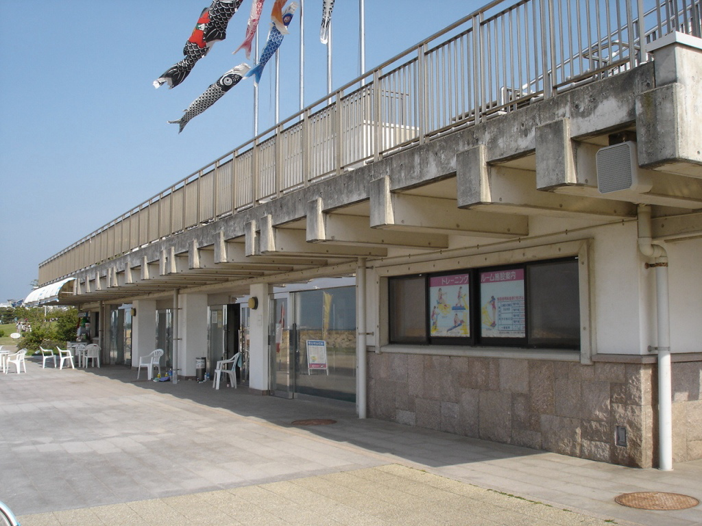 せんなん里海公園にある潮騒ビバレー